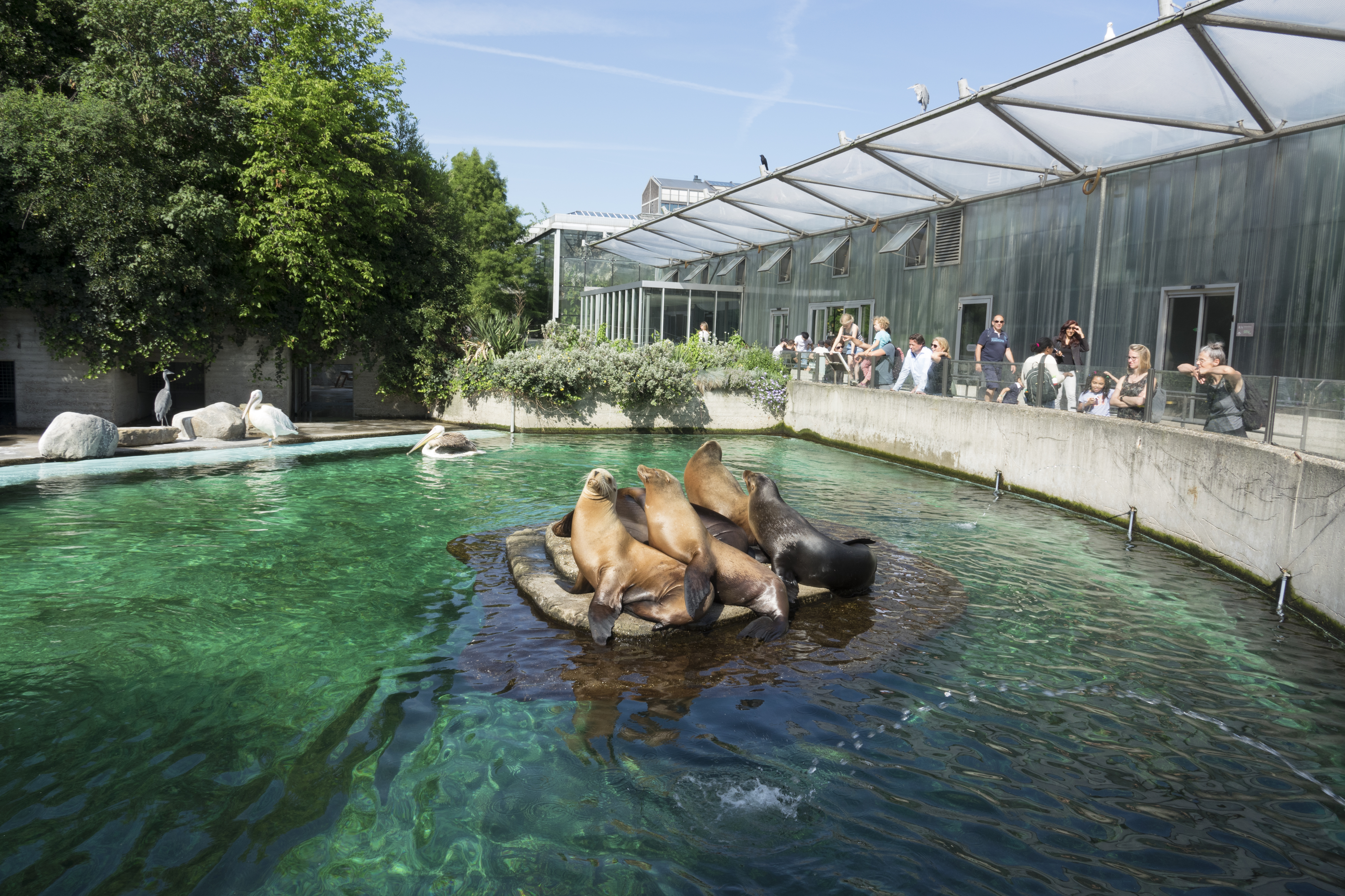 Artis Royal Zoo - Amsterdam - The Netherlands